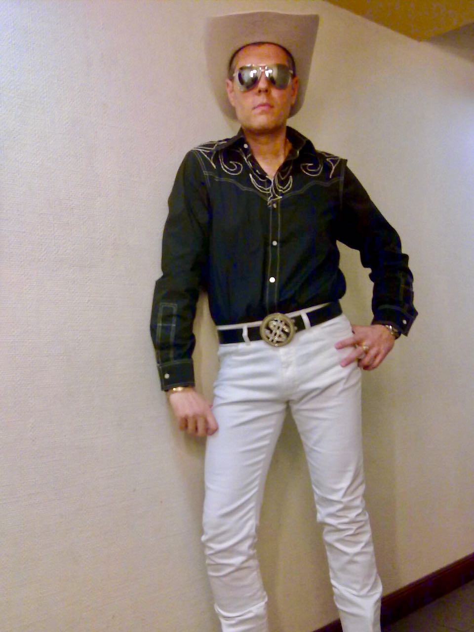 Leonardo Estévez como Escamillo